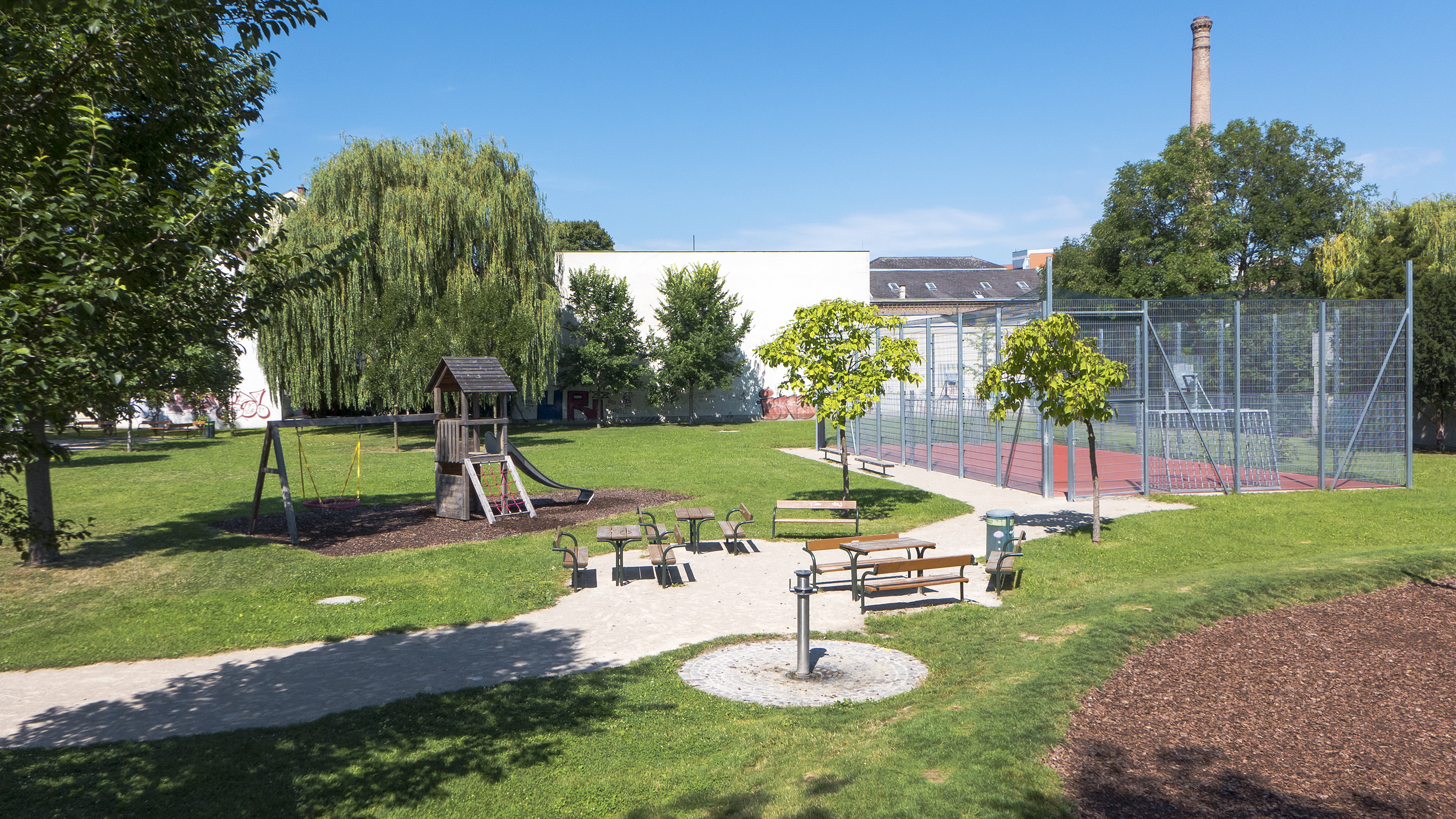 Bruno-Morpurgo-Park in Wien 23